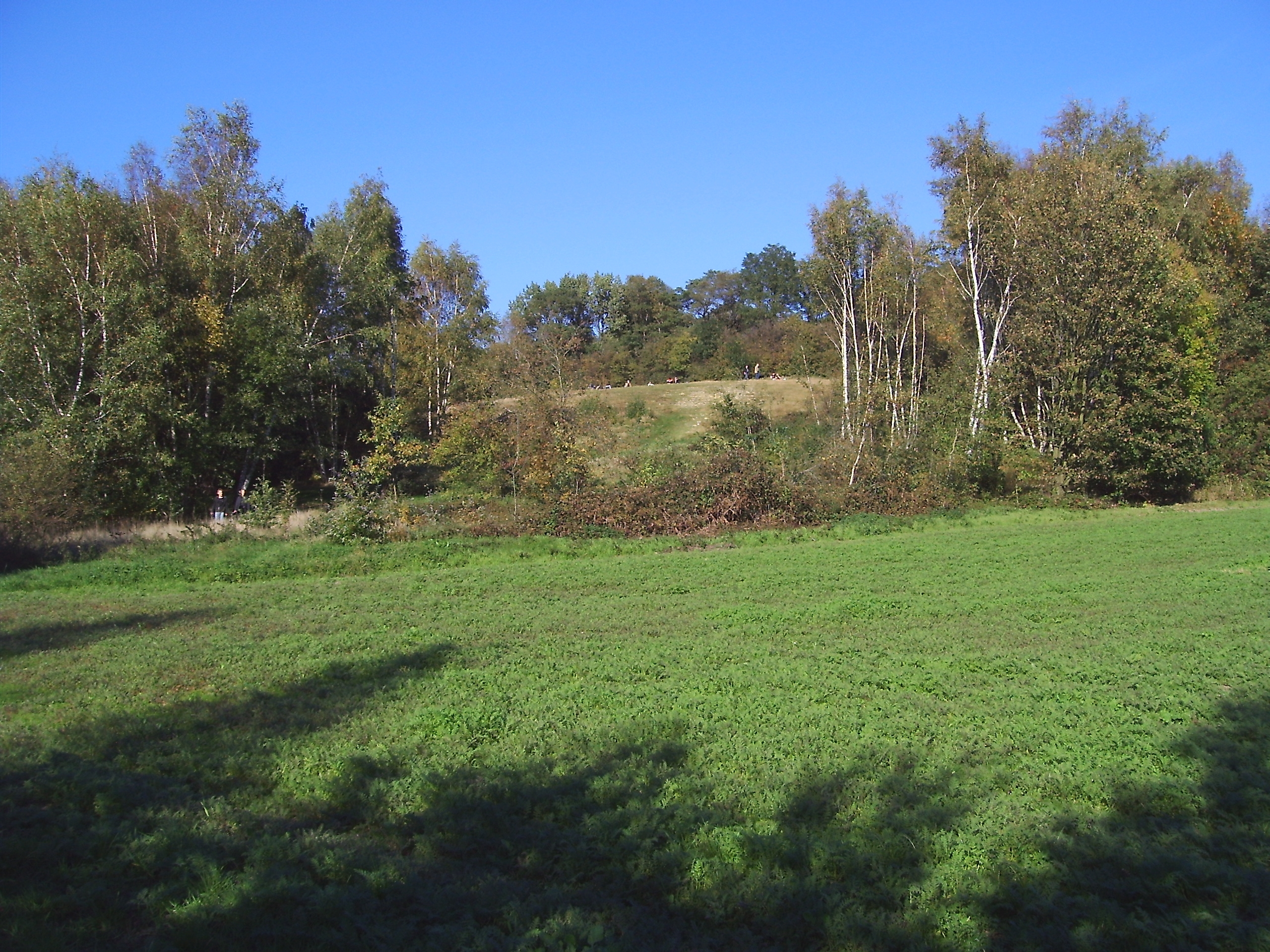 Landschaftspark Mechtenberg, Essen-Kray, Bismarckturm ist oben rechts